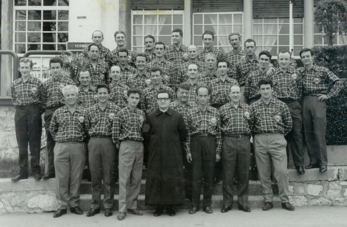 La Corale Bilacus.Nella foto qui riportata troviamo, partendo da in basso a sinistra: Gaviglio Emilio, Pelloli Mario, Gandola Emilio, Don Aldo, Gilardoni Ercole, Pirovano Umberto, Gilardoni Piero, Gilardoni Ermanno, Dolcini Nino, Landi Carlo, Gilardoni Quirino, Gilardoni Adolfo, Moizzi Giancarlo, Boleso Ettore, Gilardoni Raffaele, Gilardoni Alessandro, Raineri Raffaele, Belgeri Gilberto, Moizzi Pierino, Meda Germano, Castelli Domenico, Gilardoni Bertino, Gilardoni Piero, Gandola Nino, Gandola Giuseppe, Gilardoni Cipriano, Gilardoni Alessio, Gilardoni Raffaele, Bergami Ezio, Faustini Annibale, Raimondo Gaviglio.